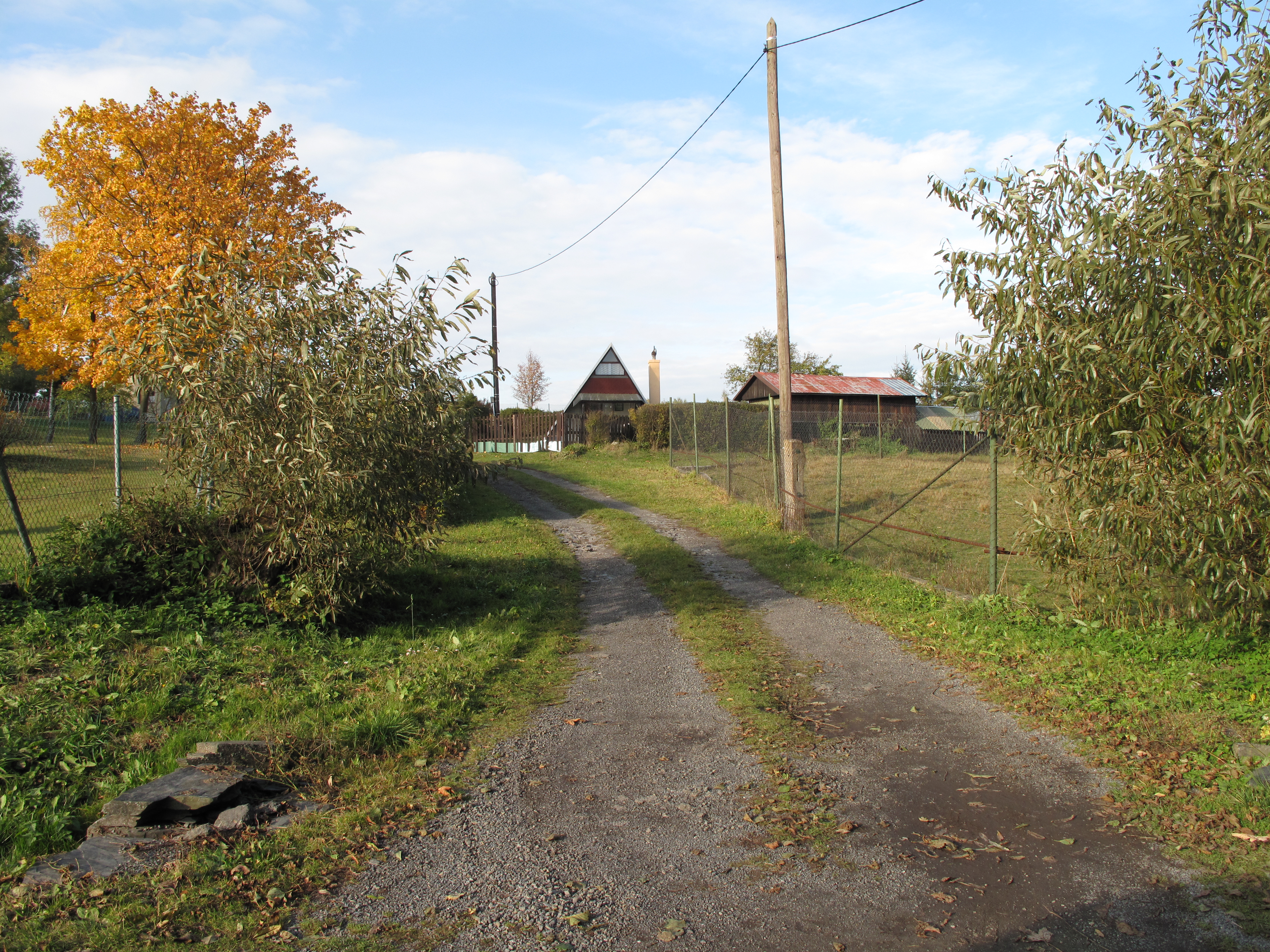 Nová Véska (Norberčany). Okres Olomouc, Česká republika.